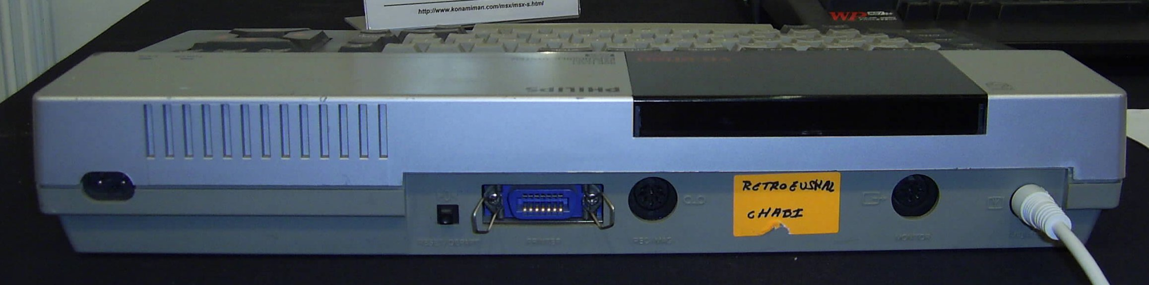 vista trasera de un ordenador doméstico Philips VG 8020 MSX en la RetroEuskal 2006